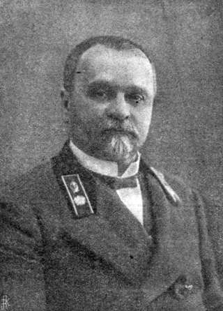 Павел Николаевич Бодянский, киевский педагог, директор Киевской 3-й гимназии.